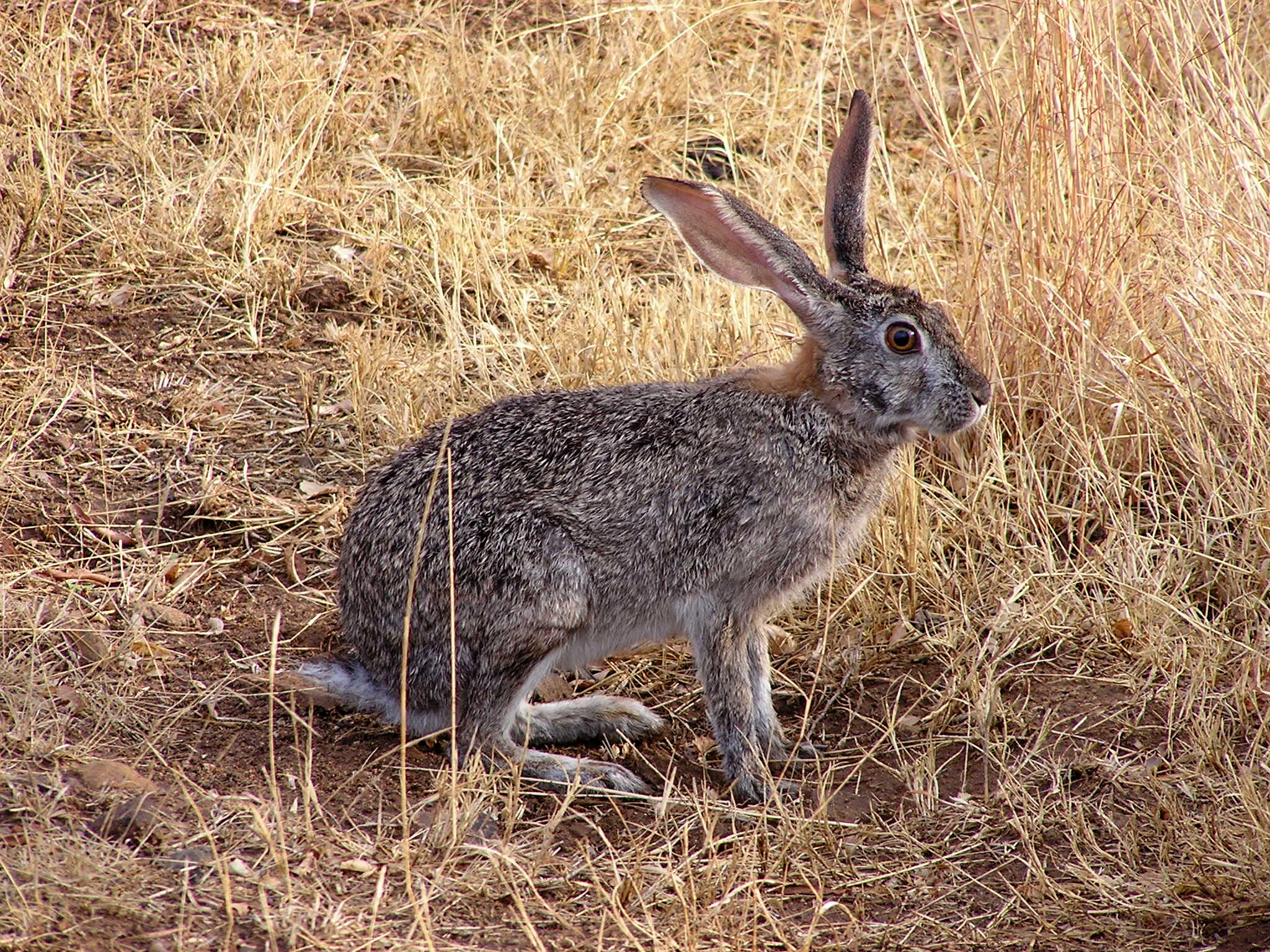 Buschhase, Pilenesberg Nationalpark